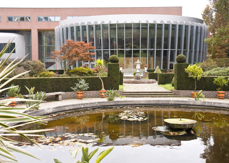 Tuin achter het Vredespaleis ontworpen door Elias Canneman en Elisabeth Canneman-Philipse in 1977